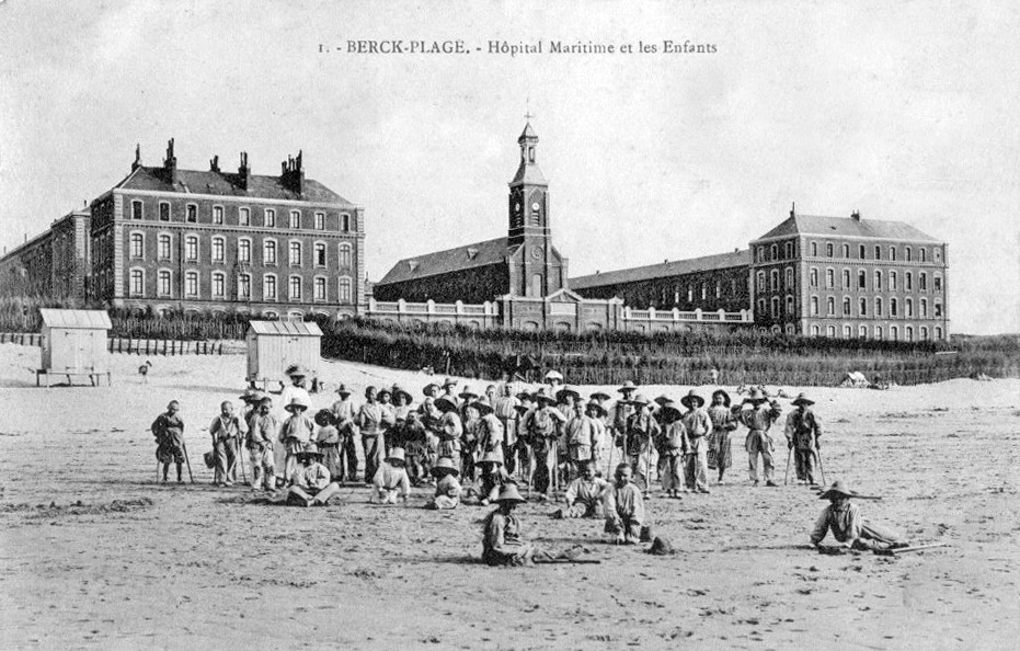 Vue vers 1900, de l'hôpital maritime de Berk, construit de 1867 à 1869, sur les plans de l'architecte Émile Lavezzari. Sur la plage les jeunes patients.